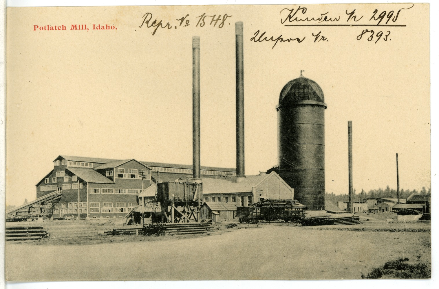 Potlatch, Idaho; Potlatch Mill This postcard is from publisher Brück & Sohn in Meißen ( postcard has a unique number 08393 and is available in a higher resolution at the publisher. This images was uploaded in a cooperation project between Wikipedians and the publisher.